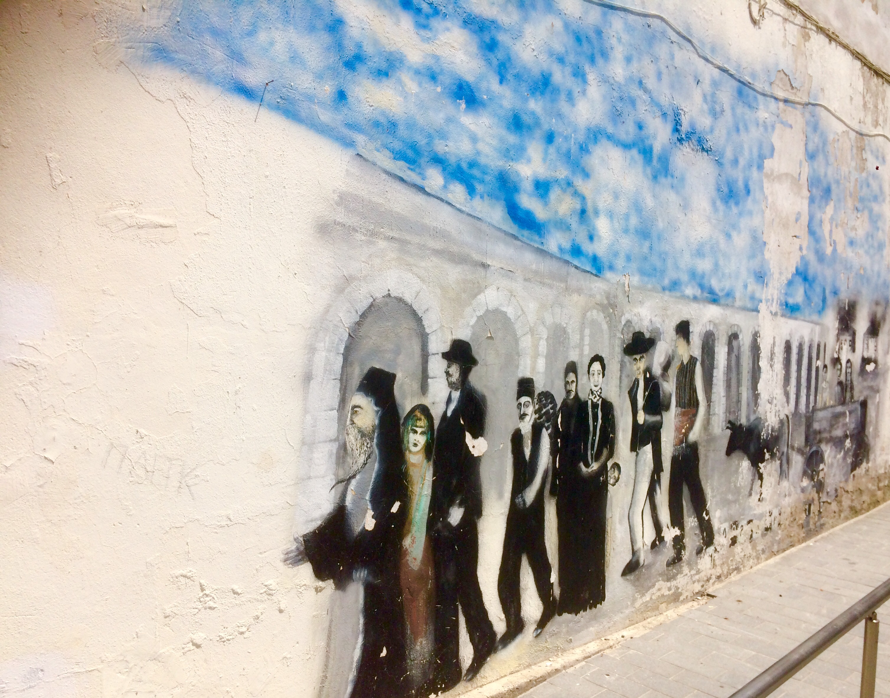 In Stadtzentrum befindliches Graffiti mit Thema der Vertreibung